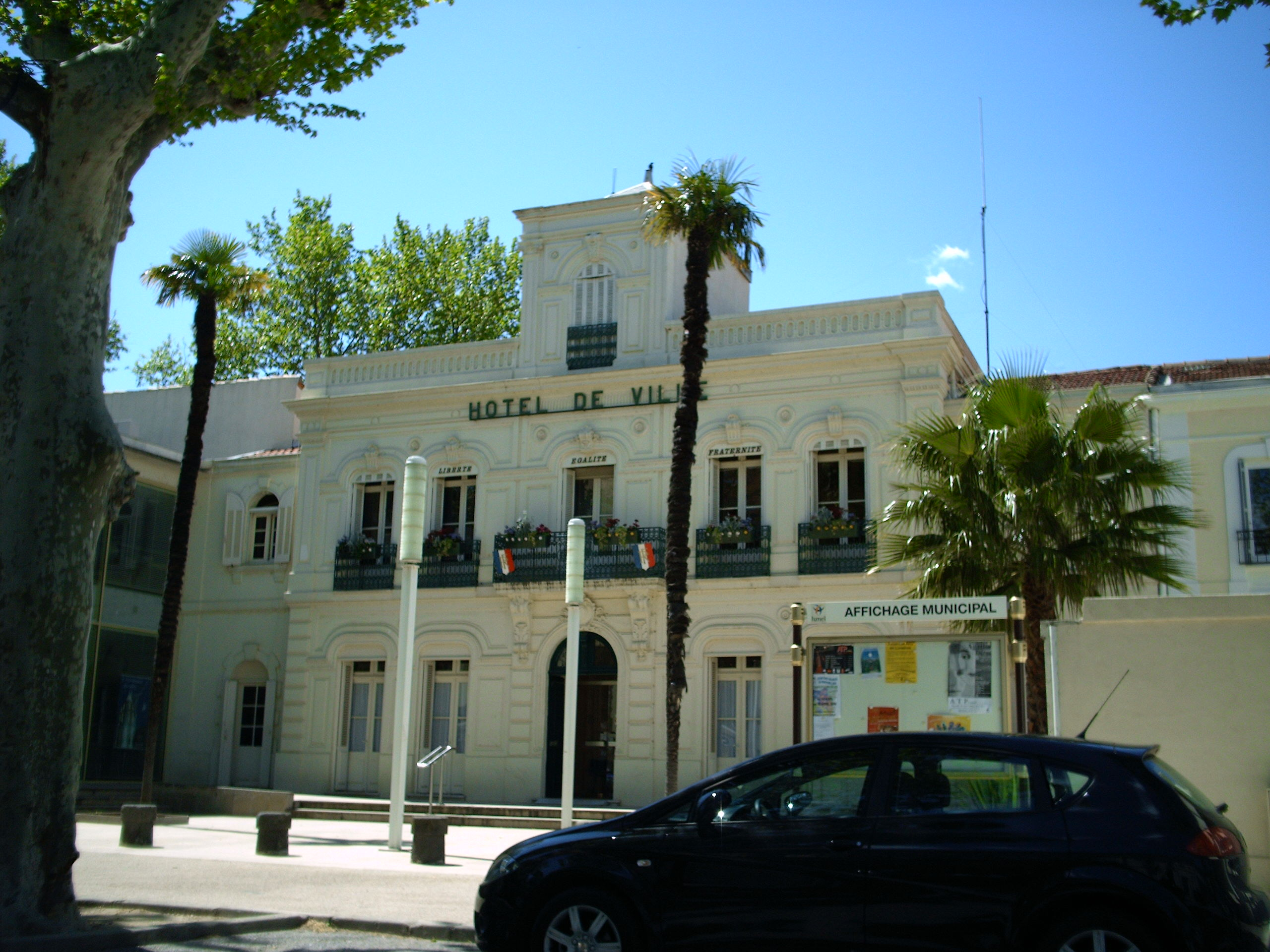 La mairie de Lunel (Hérault)